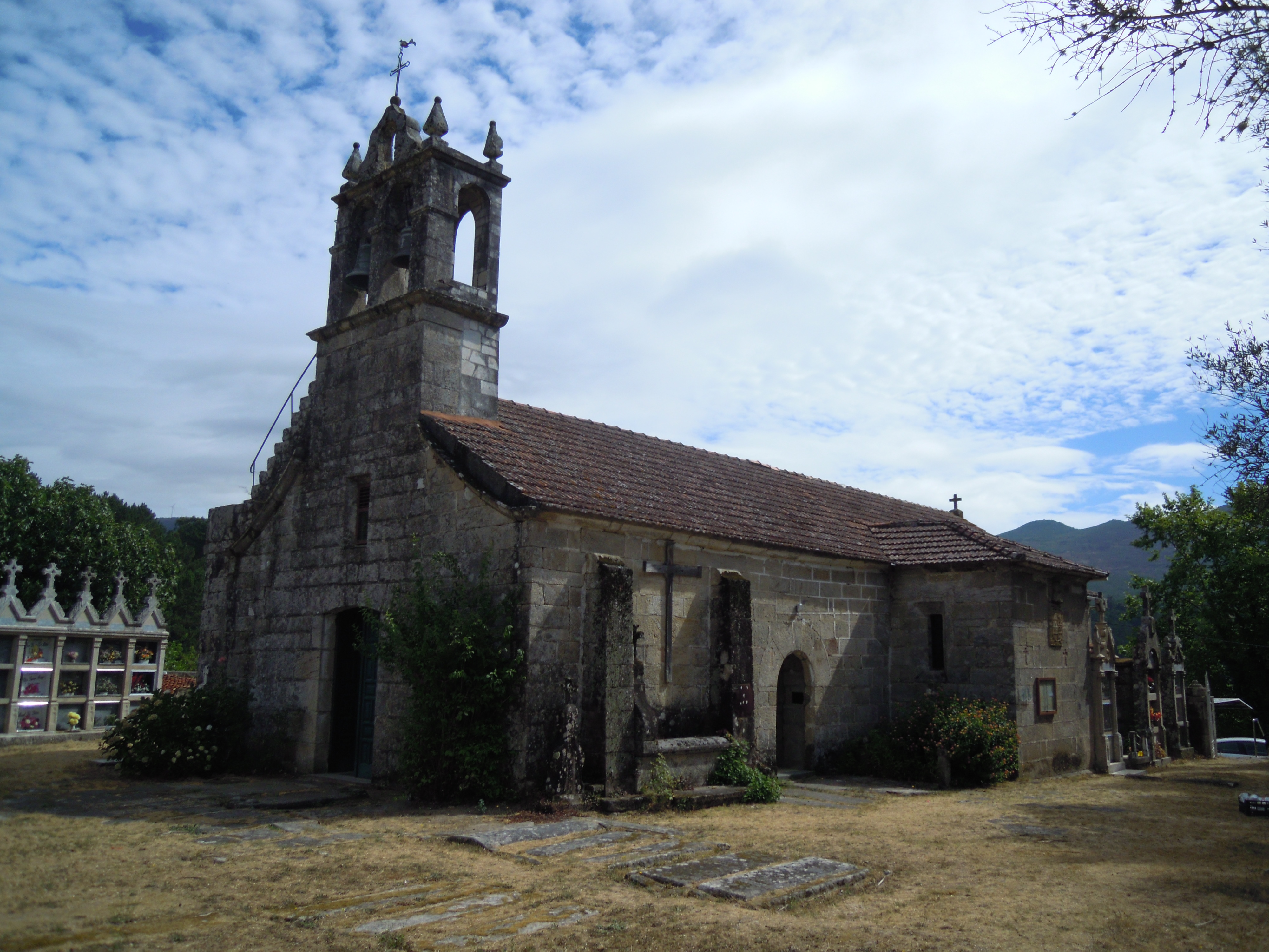 Igrexa de Santiago de Ribarteme (As Neves)